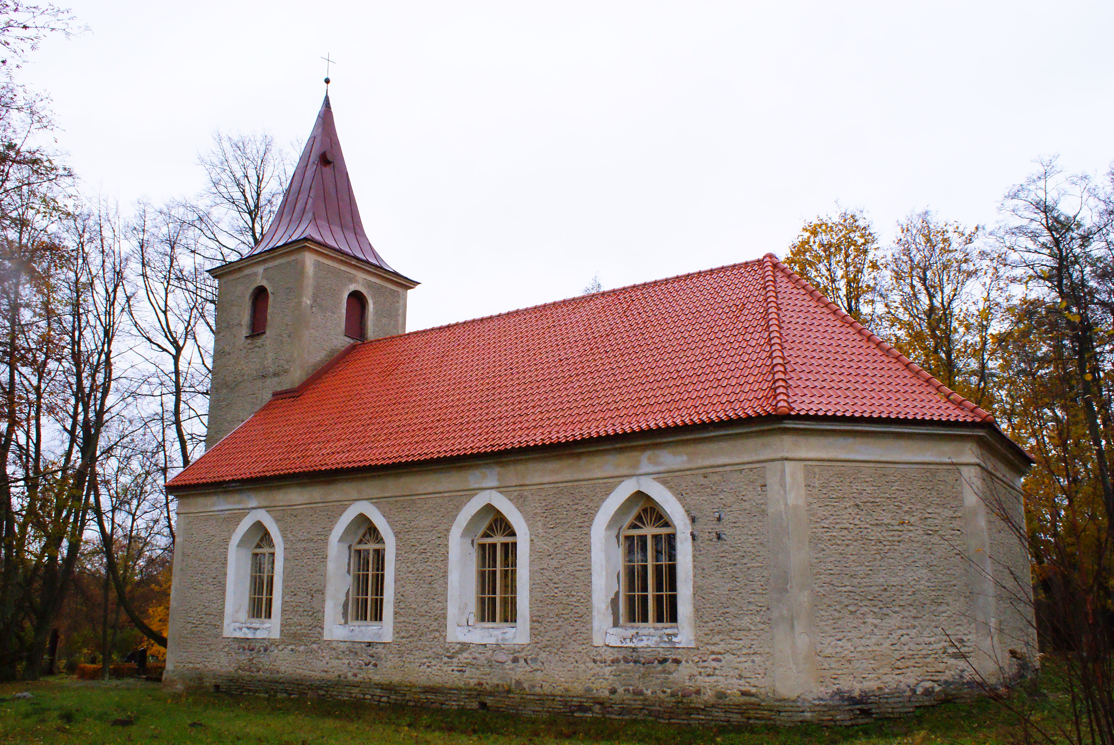 Leesi kirik